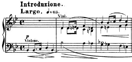 Wariacje B-dur op. 2 na temat Là ci darem la mano z opery Don Giovanni W. A. Mozarta - Fryderyk Chopin, początek utworu przetransponowanego na fortepian solo